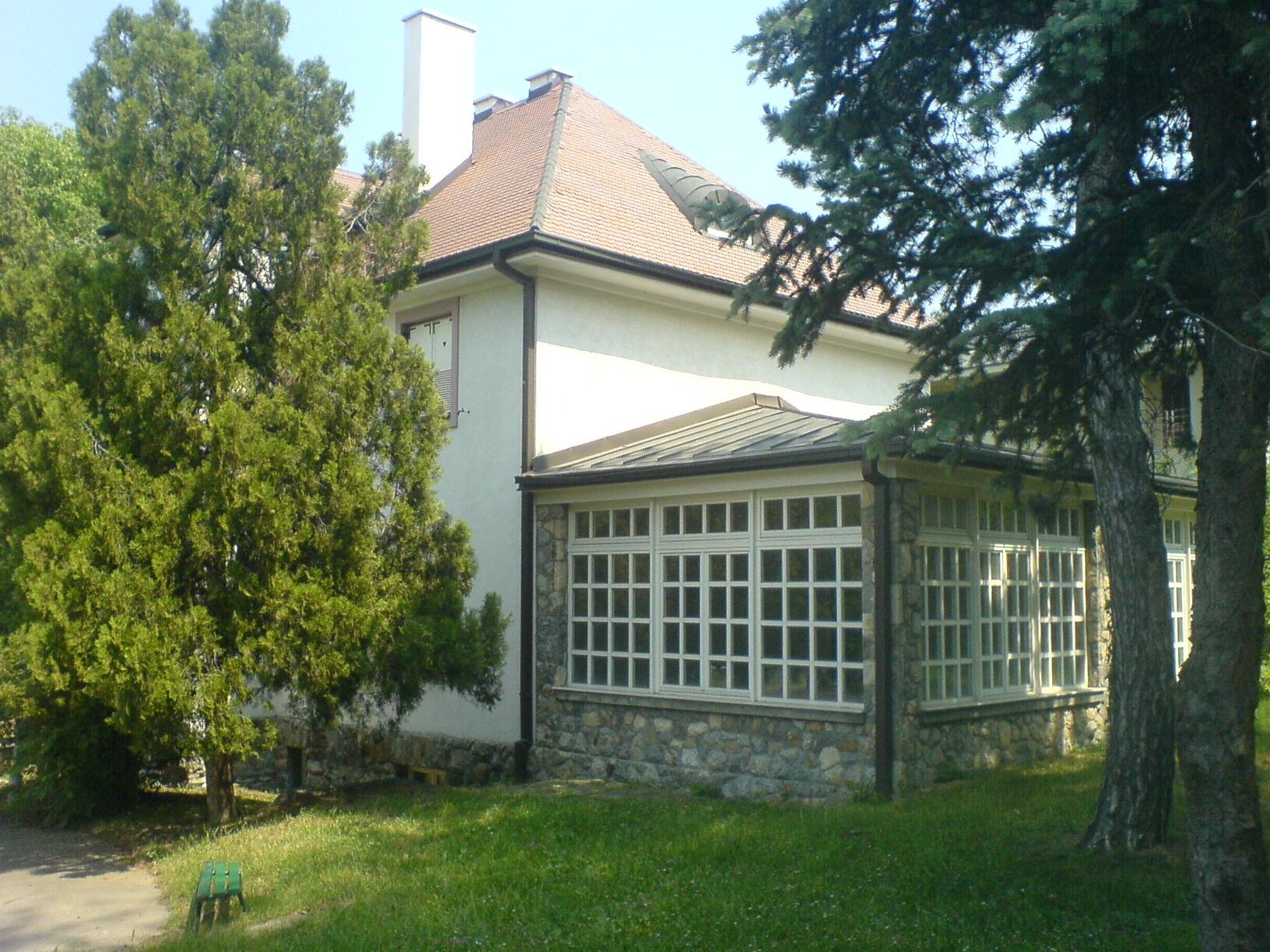 Zgrada muzeja 4. juli